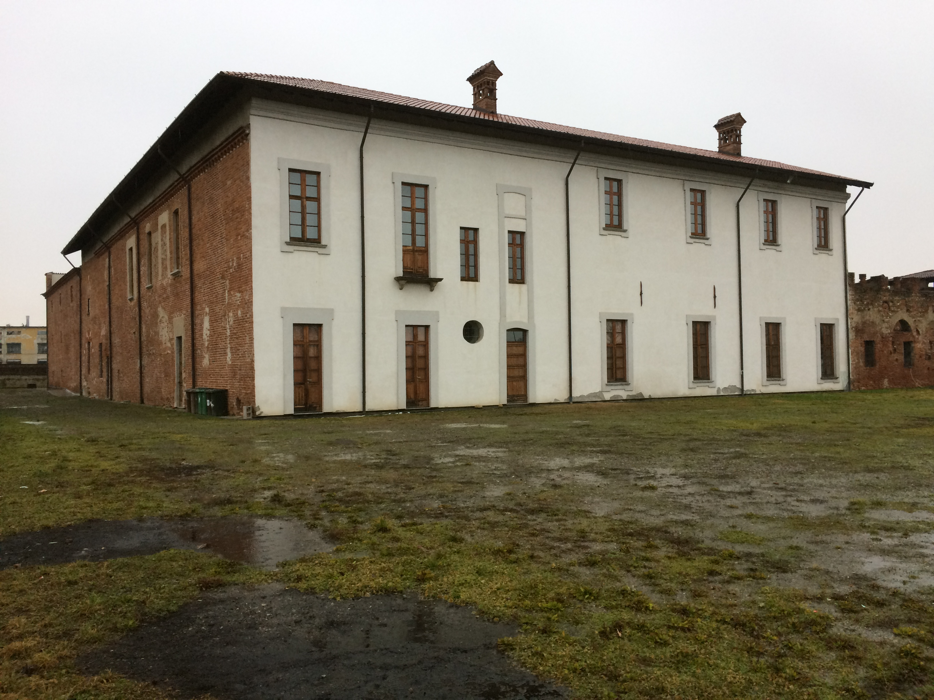 Castello di San Giorgio, Legnano